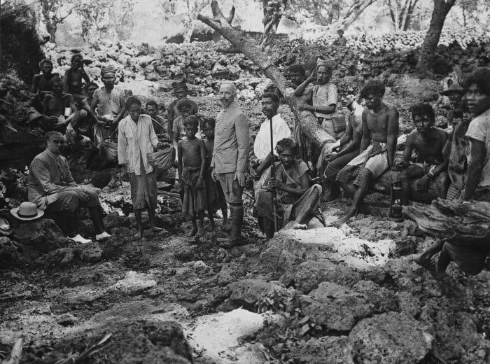 Foto. Dominee Loeff en de heer Hessink met de lokale bevolking tijdens een bezoek aan een onderaardse bron in Bolok